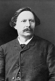 French writer Édouard Schuré (1841-1929)